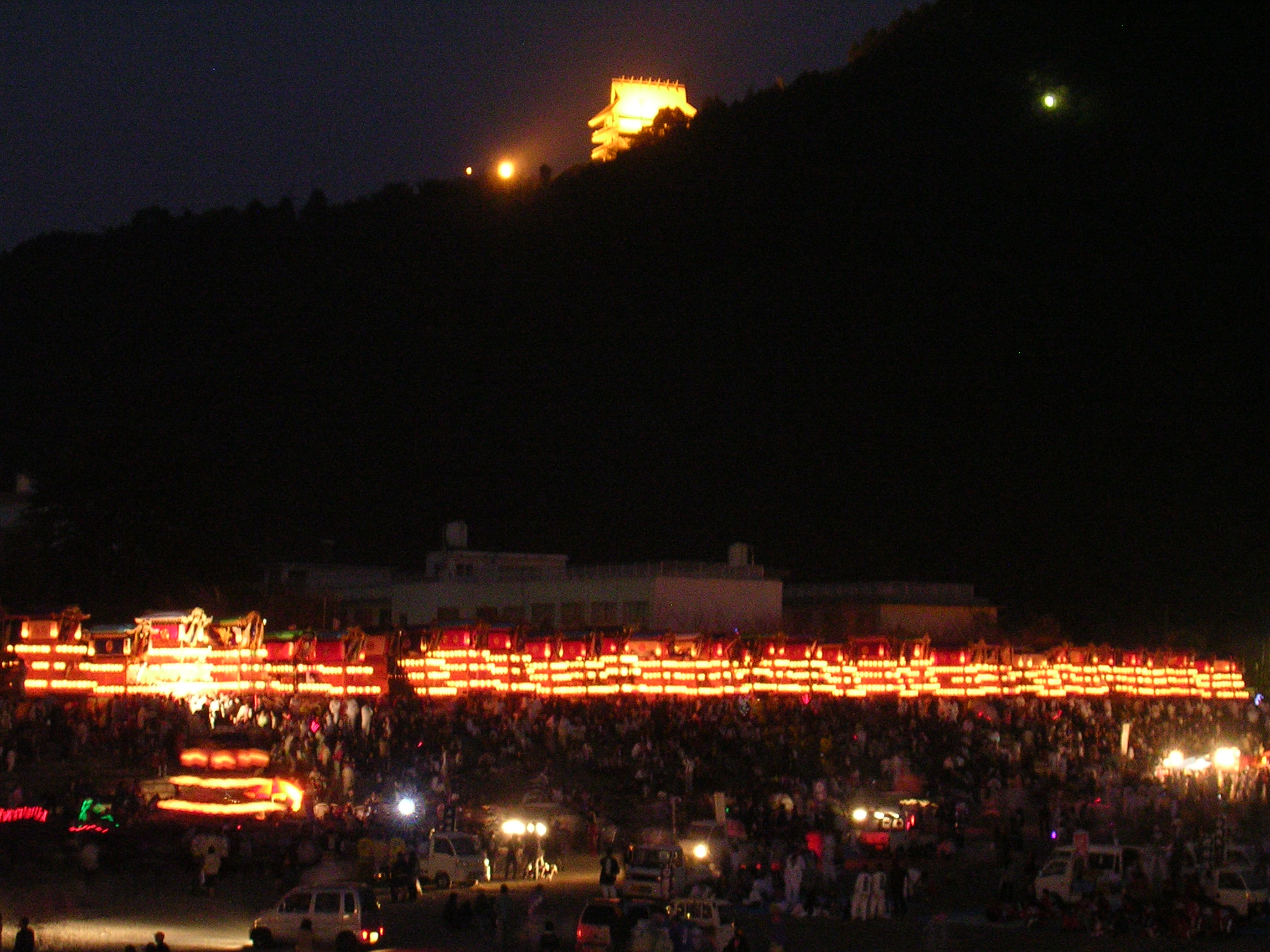 毎年10月に行われる 愛媛県 西条市 の祭礼、「西条祭り」／伊曽乃神社祭礼での宮入り風景。 市街と神域を隔てる加茂川の土手上に並んで御神輿の渡御を見送るだんじりの列。 だんじりの土手上の整列は日没前から始まるが、七十数台すべてのだんじりが並び終える頃には すっかり暗闇となってしまい、対岸から眺めても視界に入りきれないほどの台数となる。